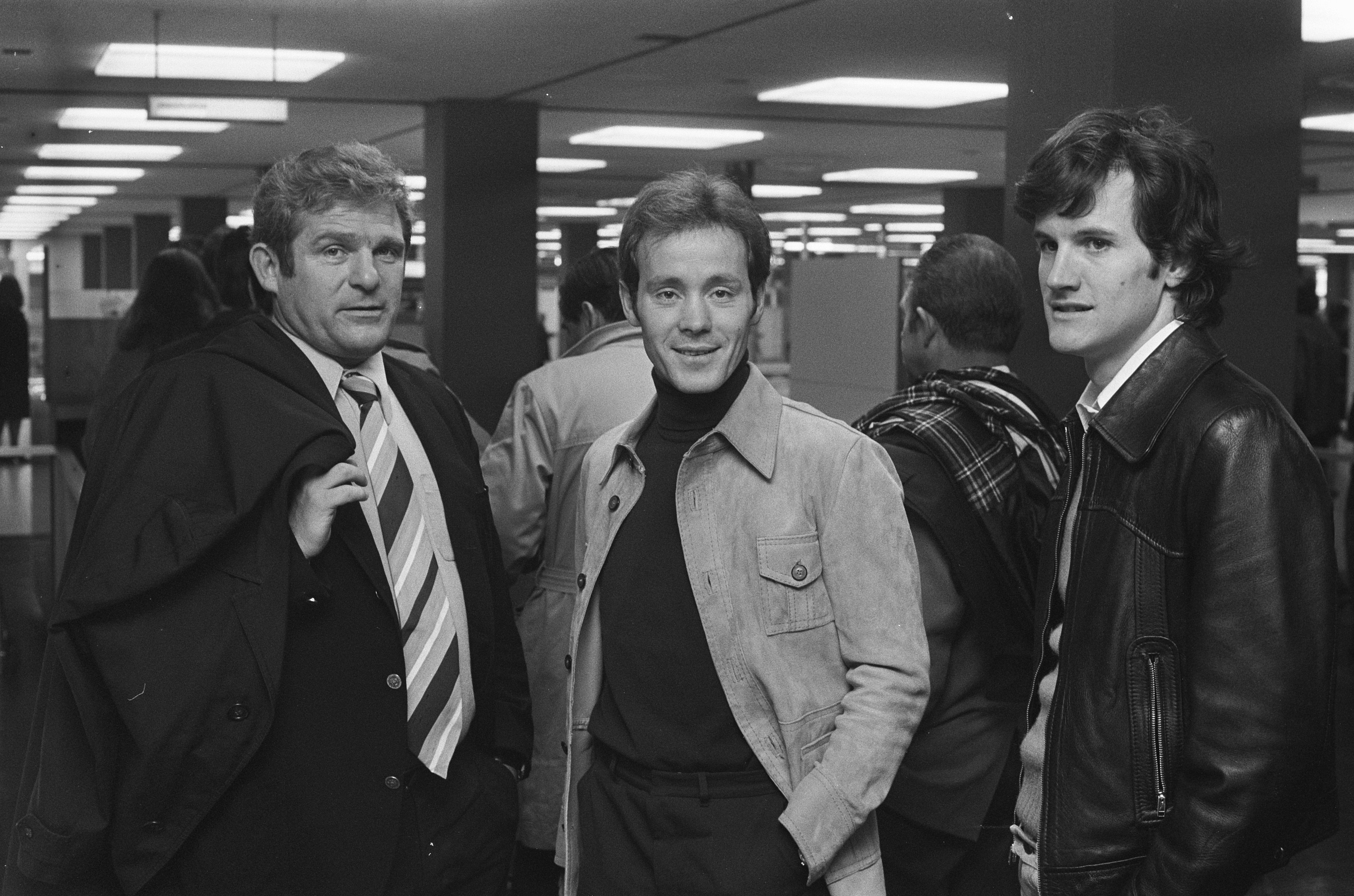 Collectie / Archief : Fotocollectie Anefo Reportage / Serie : [ onbekend ] Beschrijving : Zwitsers elftal op Schiphol voor wedstrijd tegen Nederlan woensdag aanstaande; v.l.n.r. na aankomst Hussy (trainer) Kuhn (aanvoerder) en Jeandupeux, nr. 6, 7 Datum : 8 oktober 1974 Locatie : Noord-Holland, Schiphol Trefwoorden : sport, voetballers Fotograaf : Verhoeff, Bert / Anefo Auteursrechthebbende : Nationaal Archief Materiaalsoort : Negatief (zwart/wit) Nummer archiefinventaris : bekijk toegang 2.24.01.05 Bestanddeelnummer : 927-4975